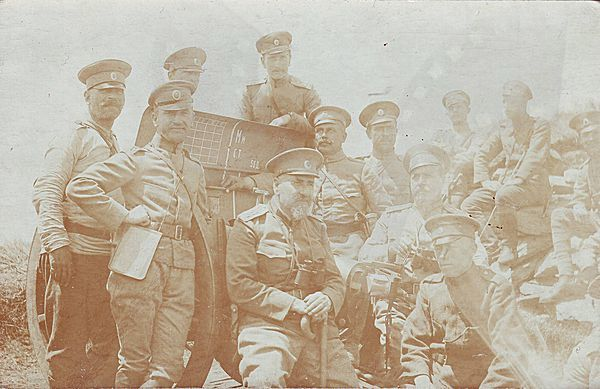 Щабът на 22 артилерийски полк на обиколка в планината Беласица.